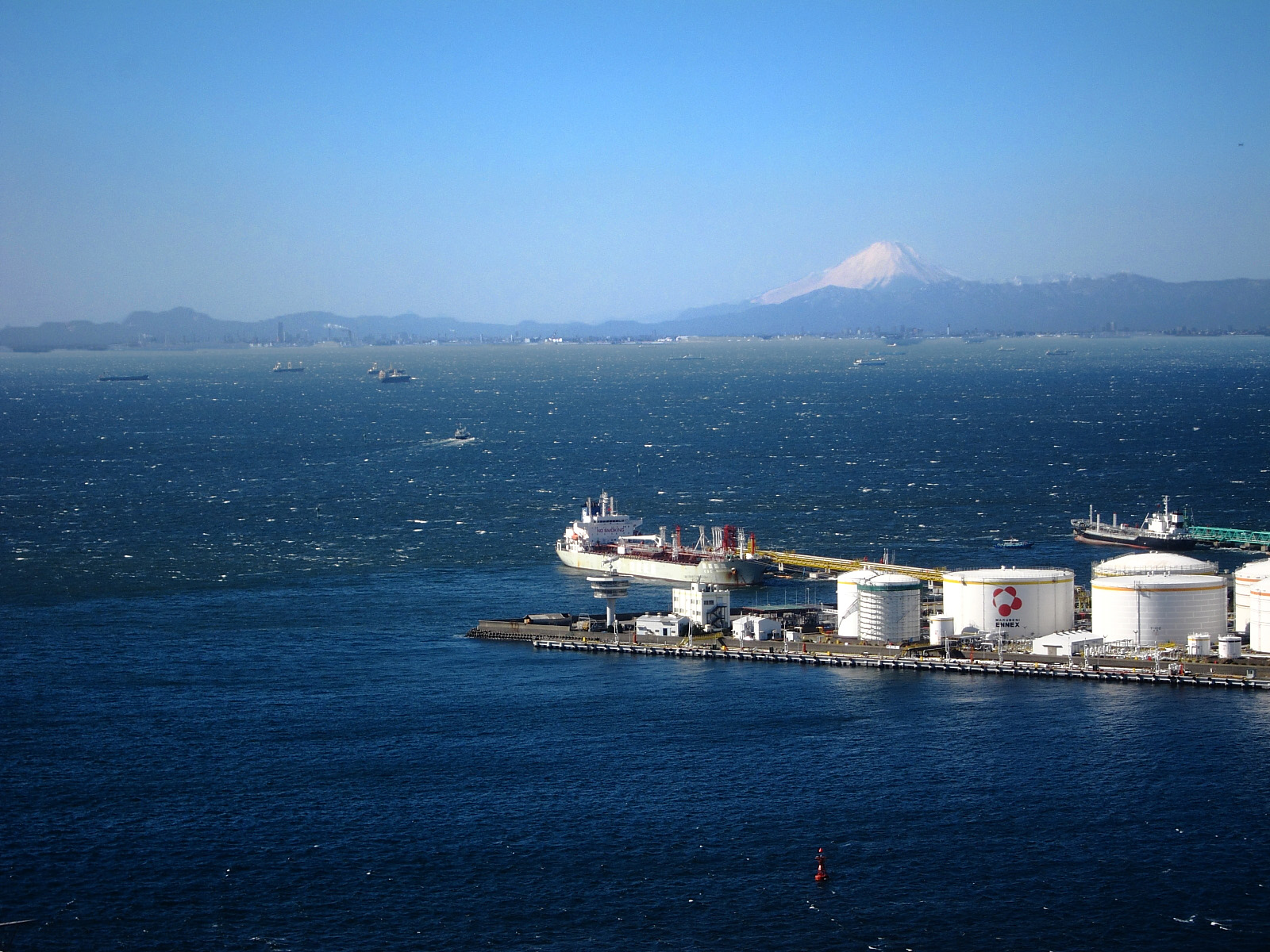 千葉港から見た東京湾。 Canon PowerShot S90